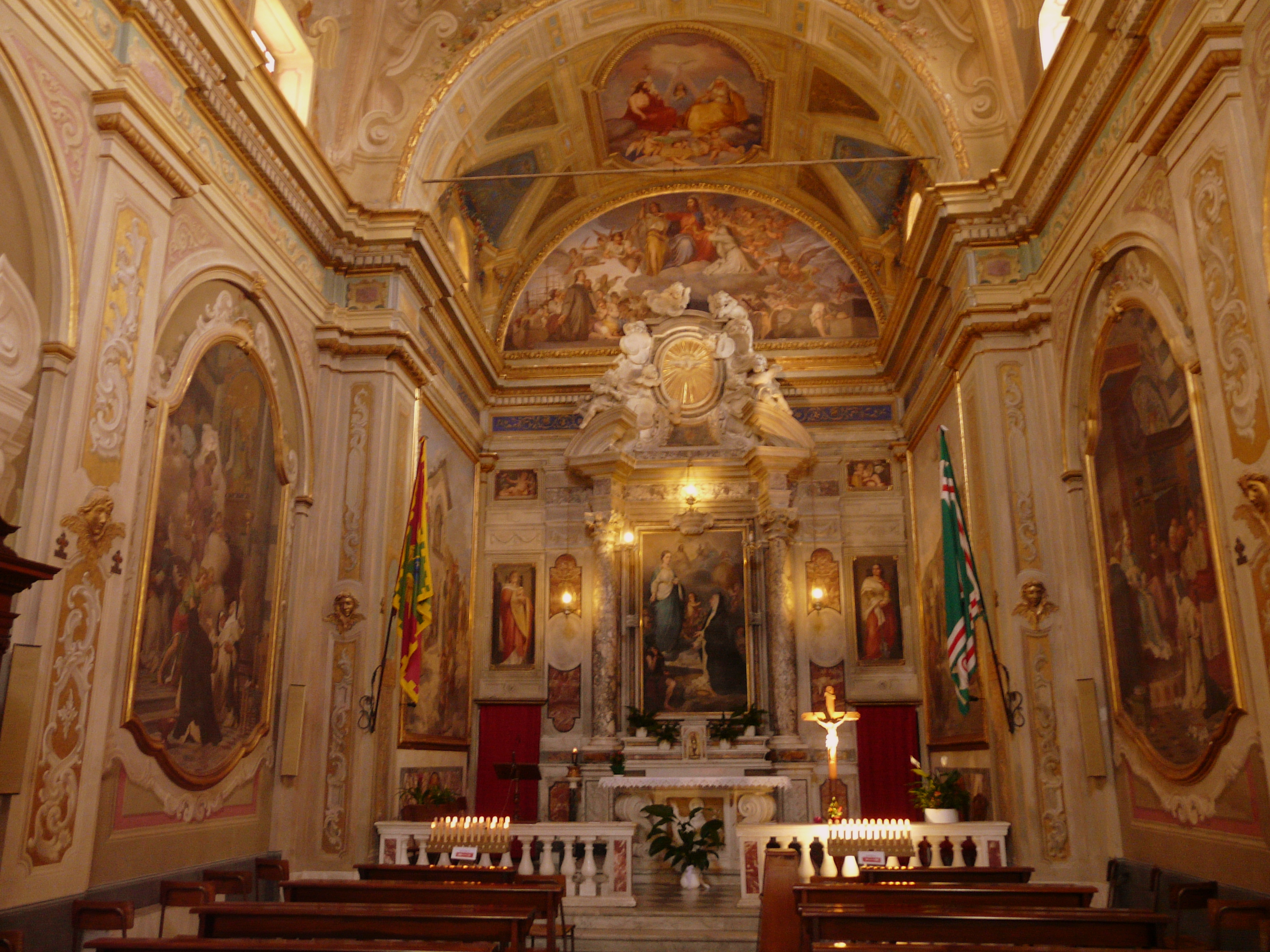 L'interno del santuario di Santa Caterina, Varazze, Liguria, Italia